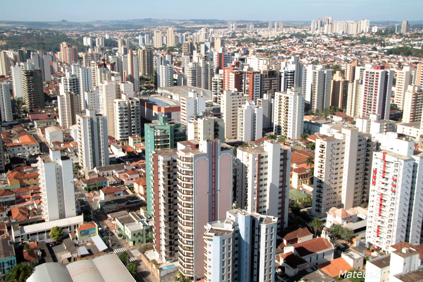 MateusZF 29-05-2011